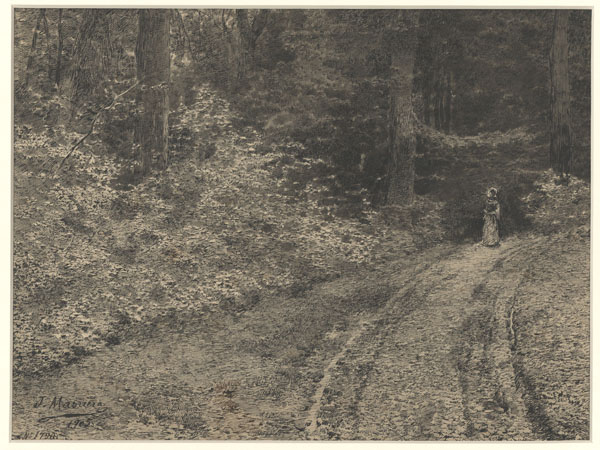 Drecera al bosc, 1905. Museu Nacional d'Art de Catalunya. Núm.Registre 1790